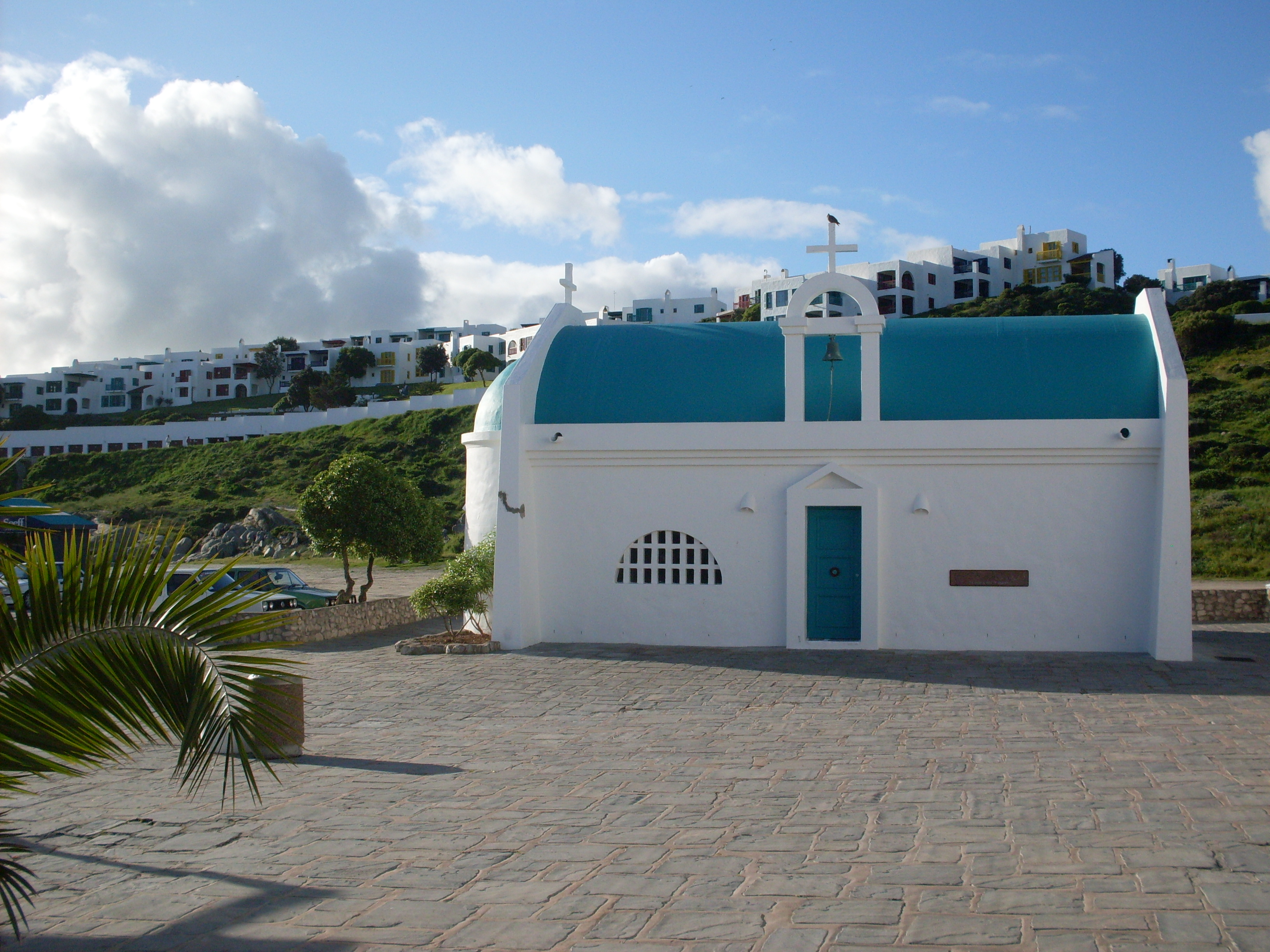 Die Agios Nikolaos (Die Beskermheilige van Matrose) Kapel